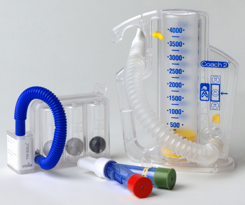 Lungen-Trainings-Geräte (lung training objects) - Tri-Ball, Coach2 und YPSI